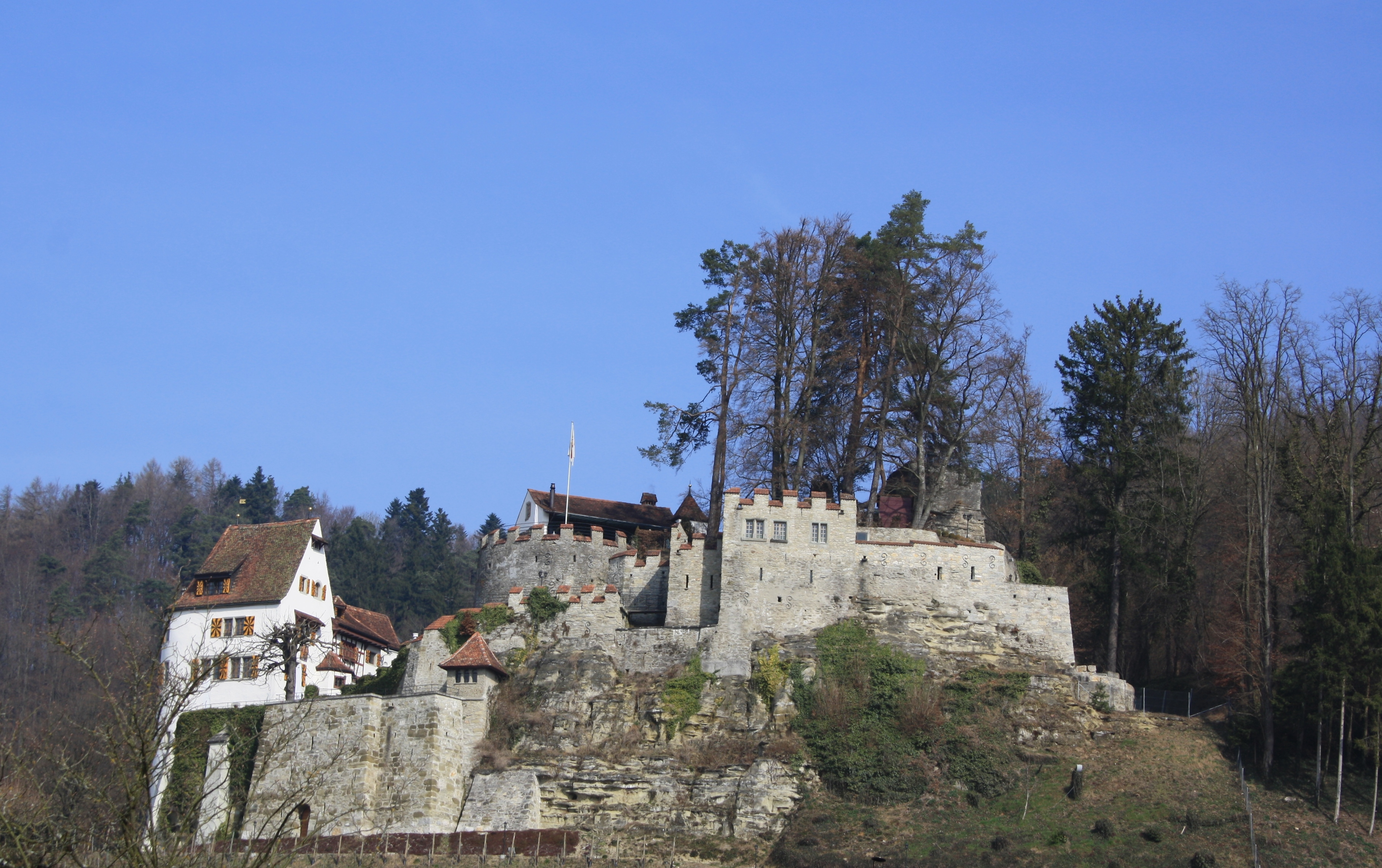 Trostburg, Teufenthal